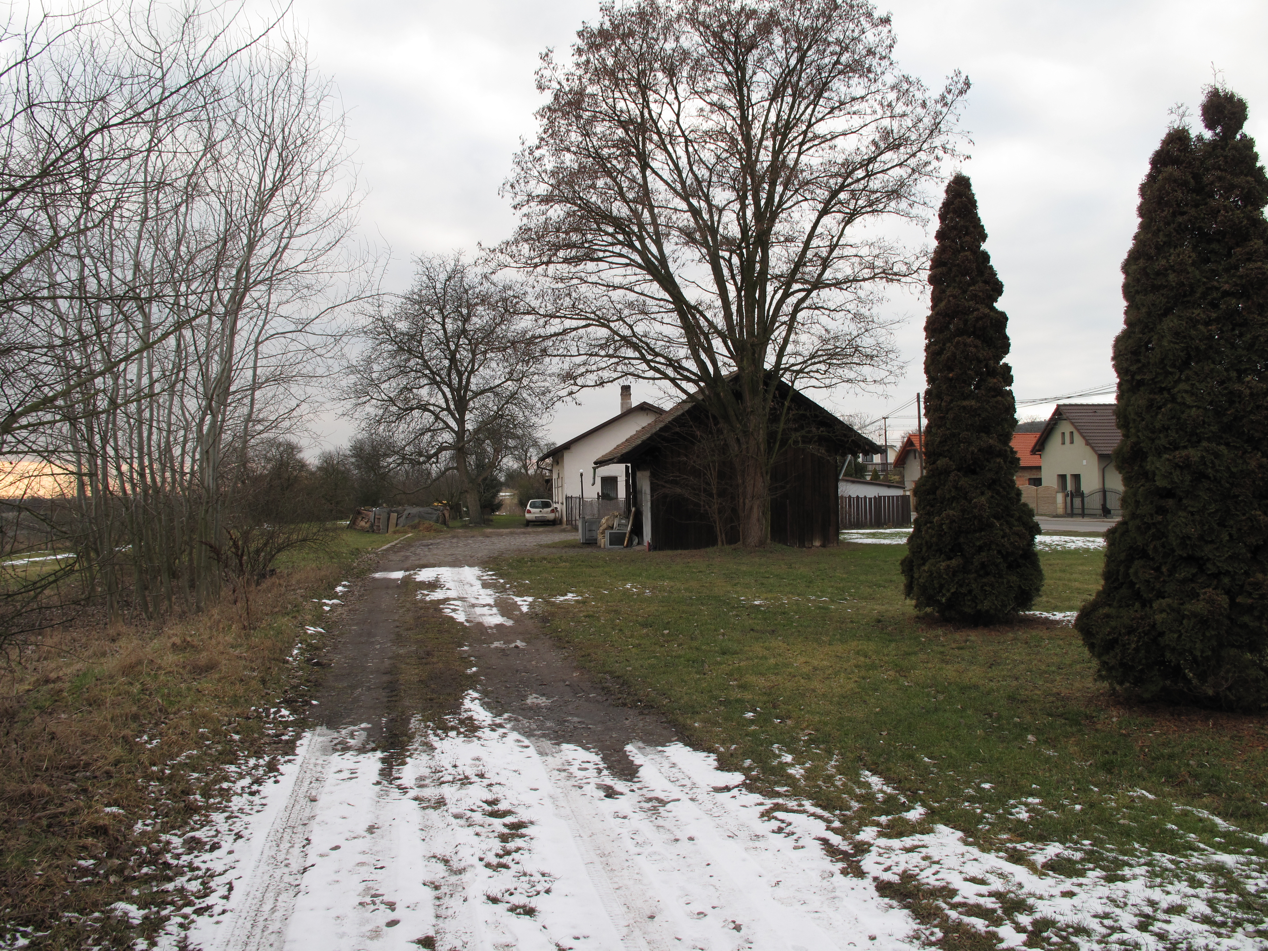 Bývalé nádraží v Žerčicích. Okres Mladá Boleslav, Česká republika.